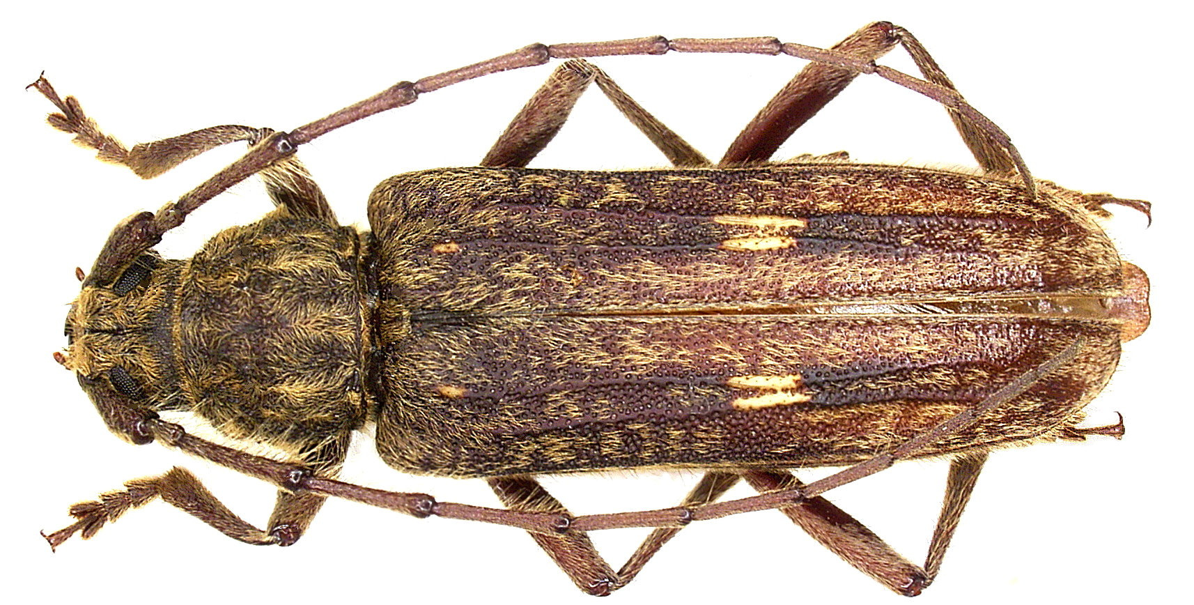 Familie: Cerambycidae Grösse: 22 mm Fundort: Kenia, Taita Hills leg. det. U.Schmidt, 1991 Foto: U.Schmdit, 2006